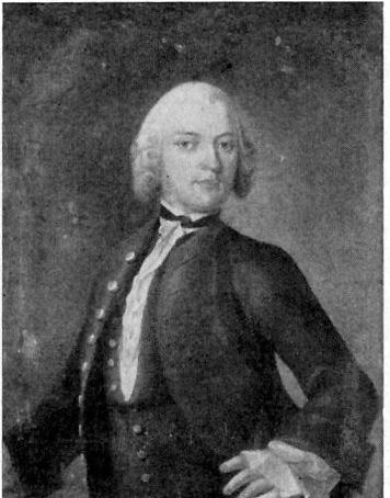 Johan Beck-Friis (1729-1796). Pudrad peruk, blå väst och rock, förgyllda knappar, blå fond.